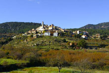 Vista pueblo